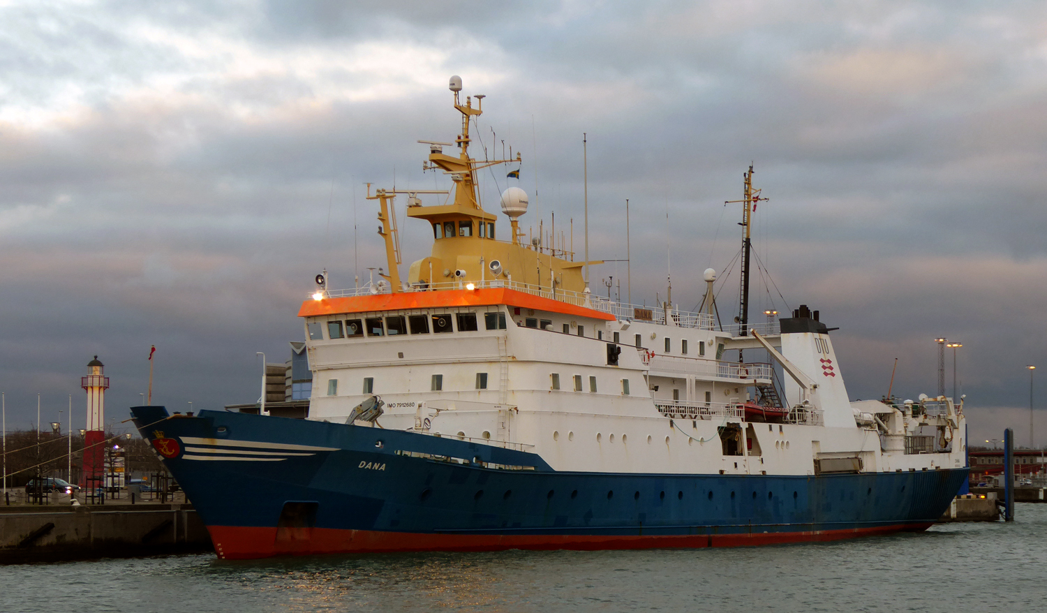 R/V Dana är ett Danskt forskningsfartyg tillhörande DTU, här på besök i Ystad 18 nov 2016.